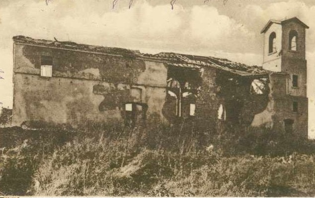 Црквата „Св. Ѓорѓи“ во Стар Дојран , позната како Грчка Црква